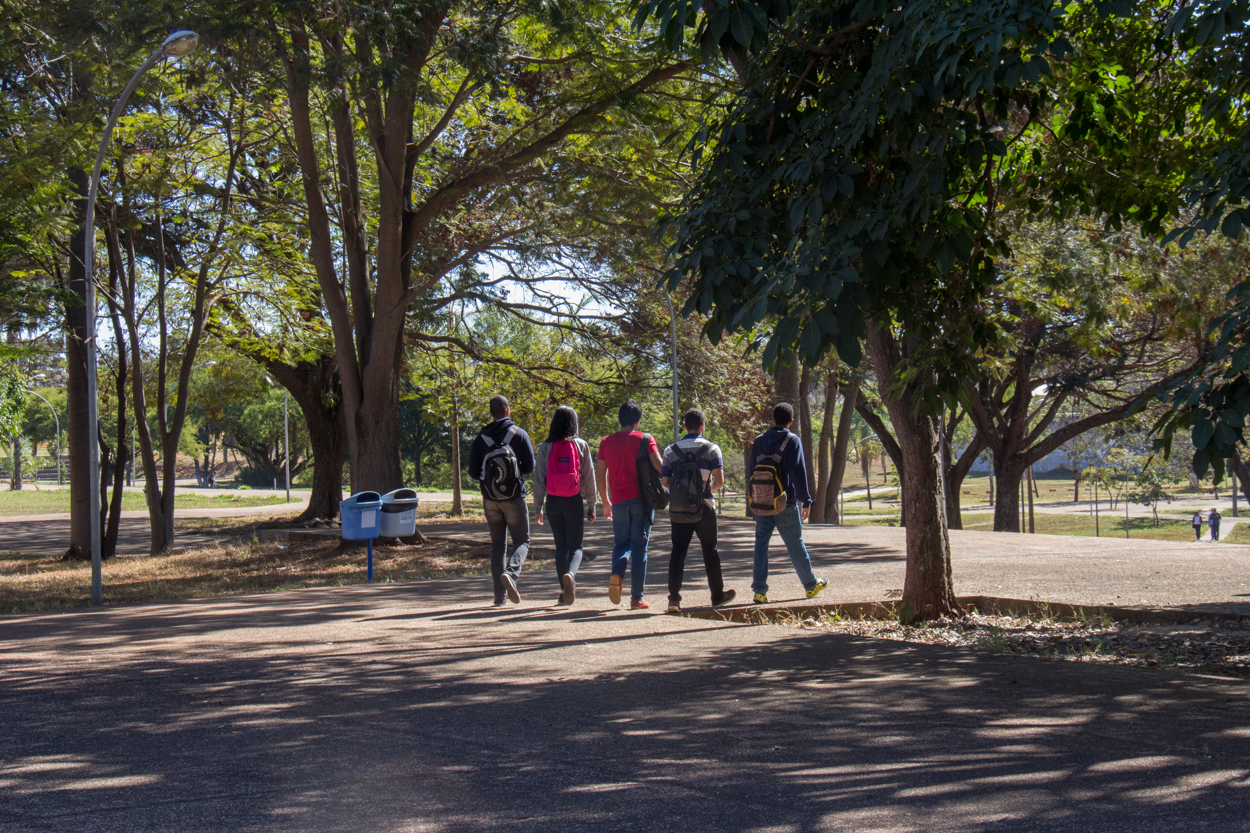 Foto: Beatriz Ferraz